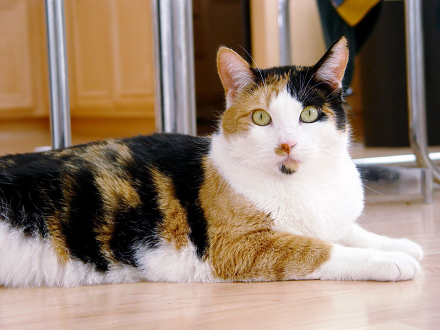 Calico cat (Felis silvestris catus)